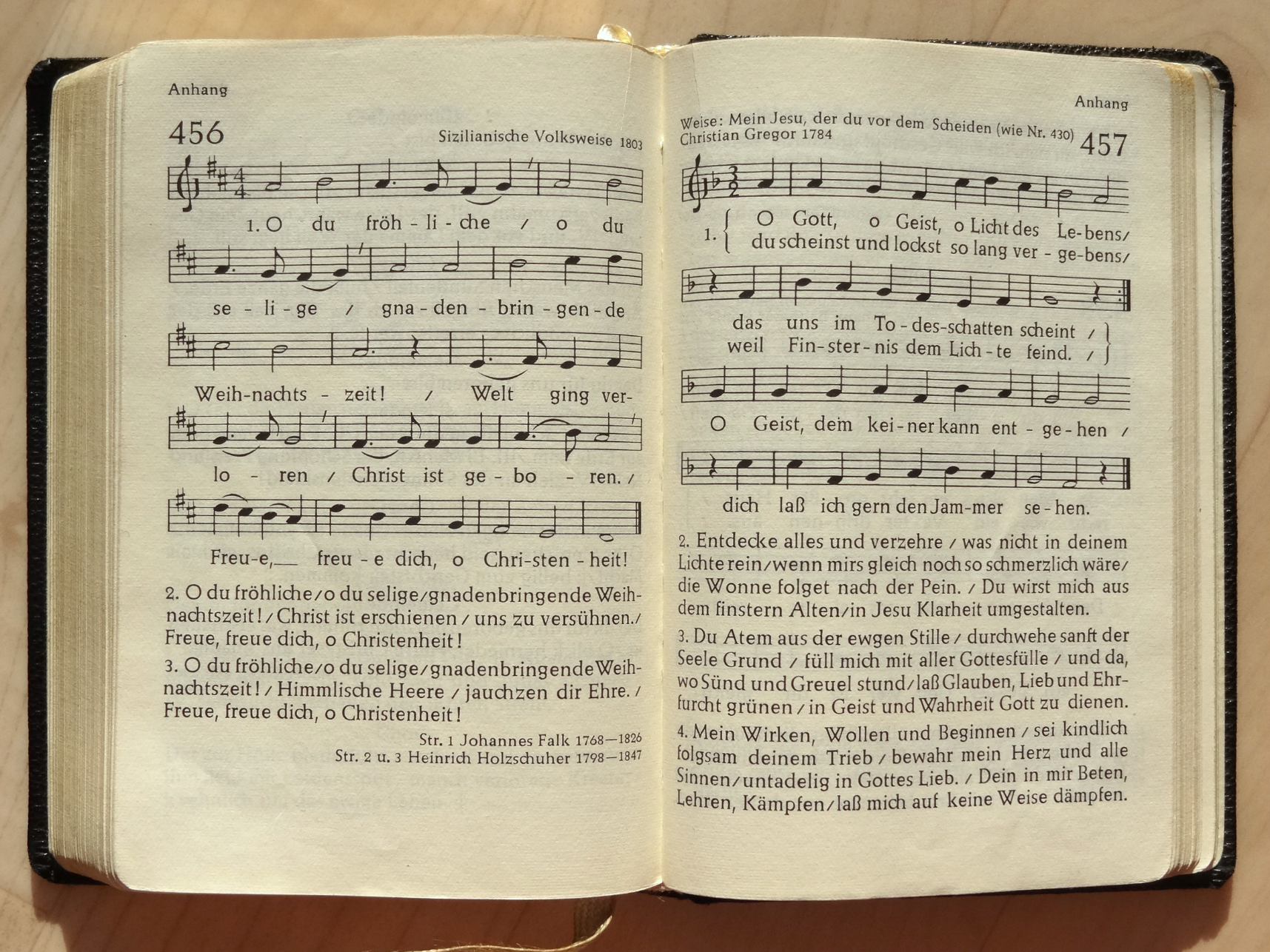 Verlag der Evangelischen Kirche in Hessen und Nassau: Der Herr ist mein Hirte, Gesangbuch, Evangelisches Kirchengesangbuch für die Evangelische Kirche in Hessen und Nassau, 17. Auflage, Herausgegeben auf Beschluß der Ersten Kirchensynode der Evangelischen Kirche in Hessen und Nassau vom 14. April 1950, Darmstadt, 1962, Liederanhang zum Evangelischen Kirchengesangbuch für die Evangelische Kirchen Hessens, 456. Oh du fröhliche, Sizilianische Volksweise 1803, Str. 1 Johannes Falk 1768-1826, Str. 2 u. 3 Heinrich Holzschuber 1798-1847, 457. O Gott, o Geist, o Licht des Lebens, Weise: Mein Jesu, der du vor dem Scheiden (wie Nr. 430), Christian Gregor 1784, Gerhard Tersteegen 1697-1769